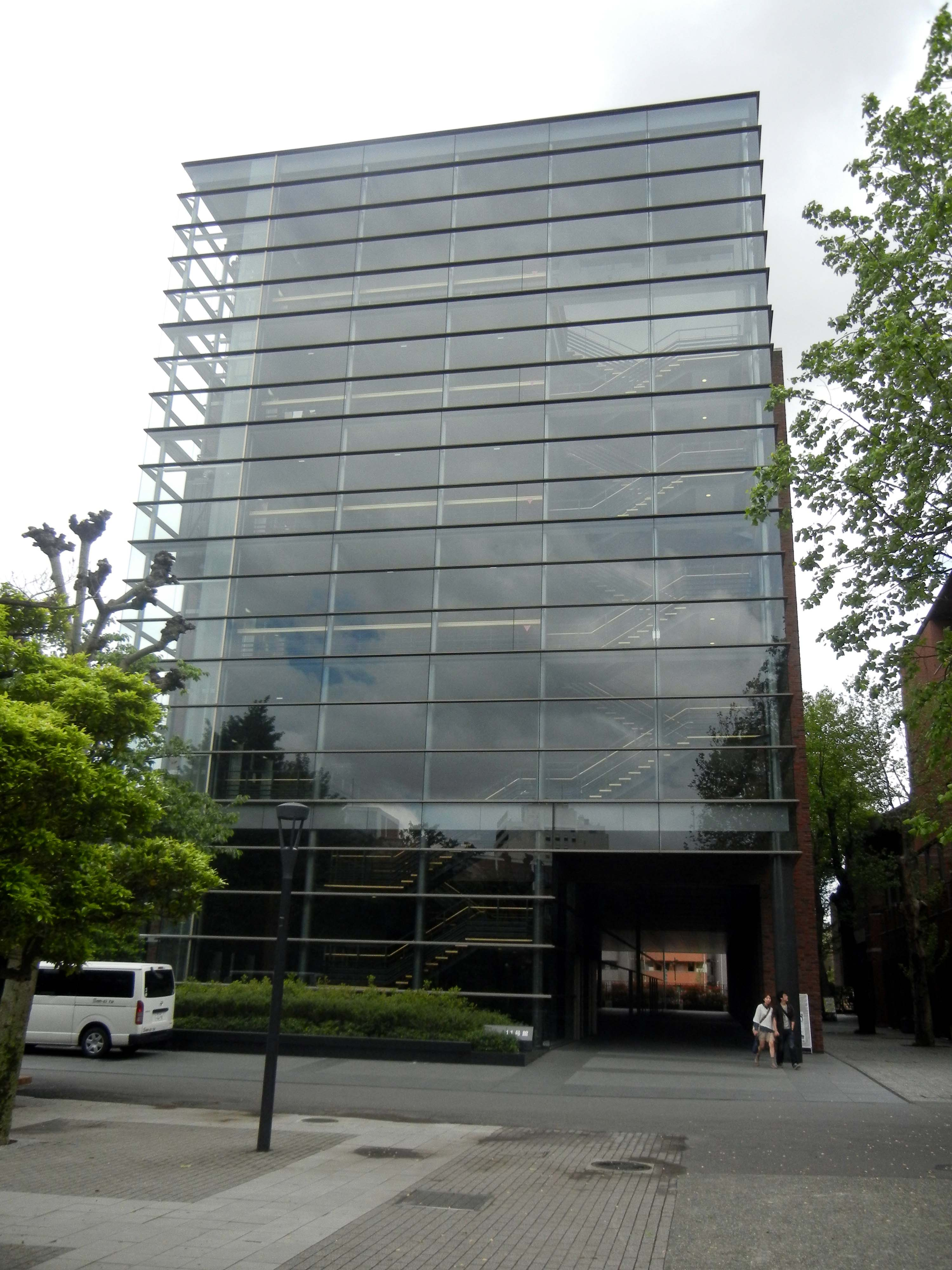 立教大学池袋キャンパス11号館